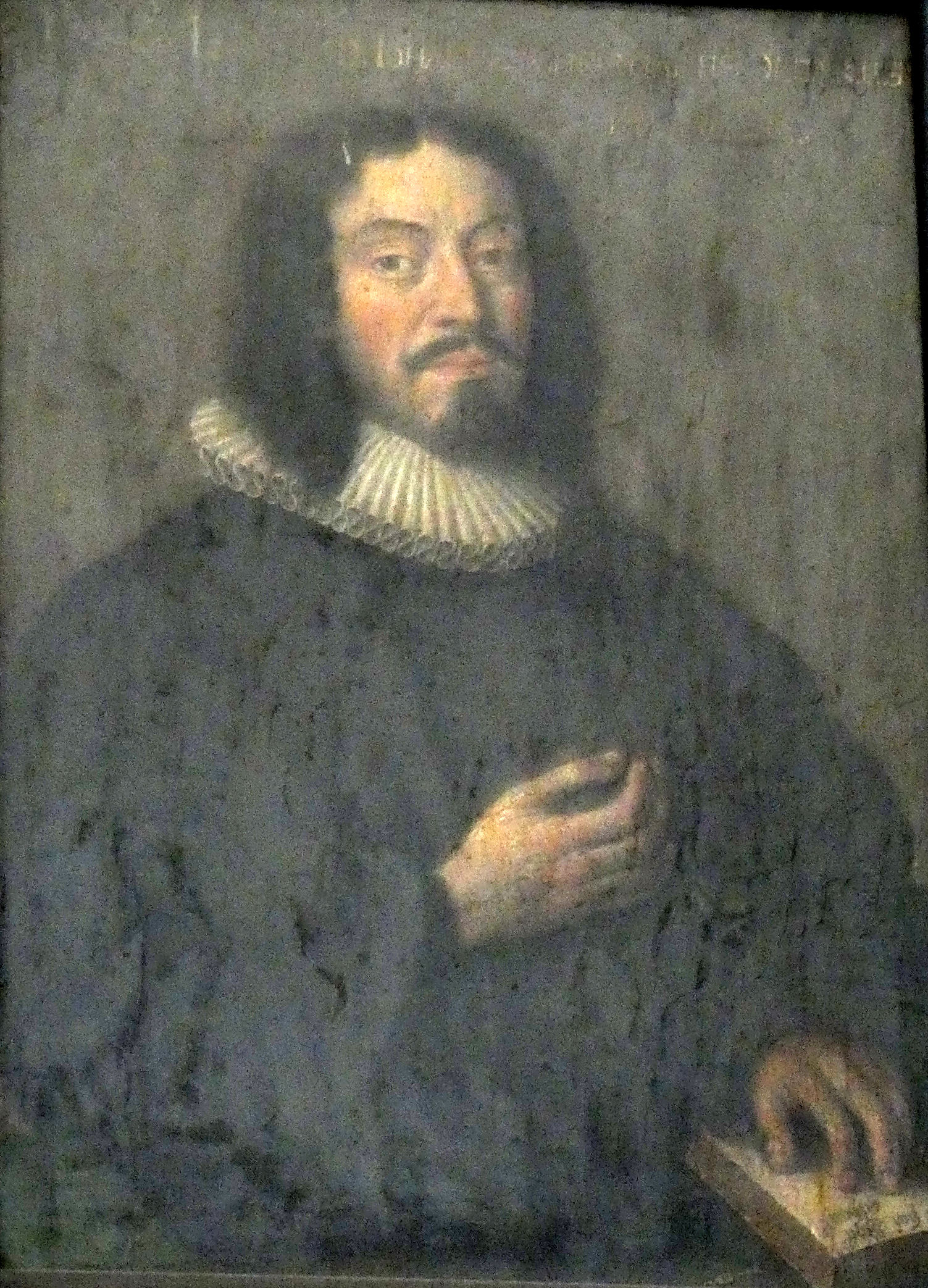 Fotografische Reproduktion (bearb.) eines Porträtgemäldes des Oberpfarrers der Marktkirche Halle Johann Christian Olearius